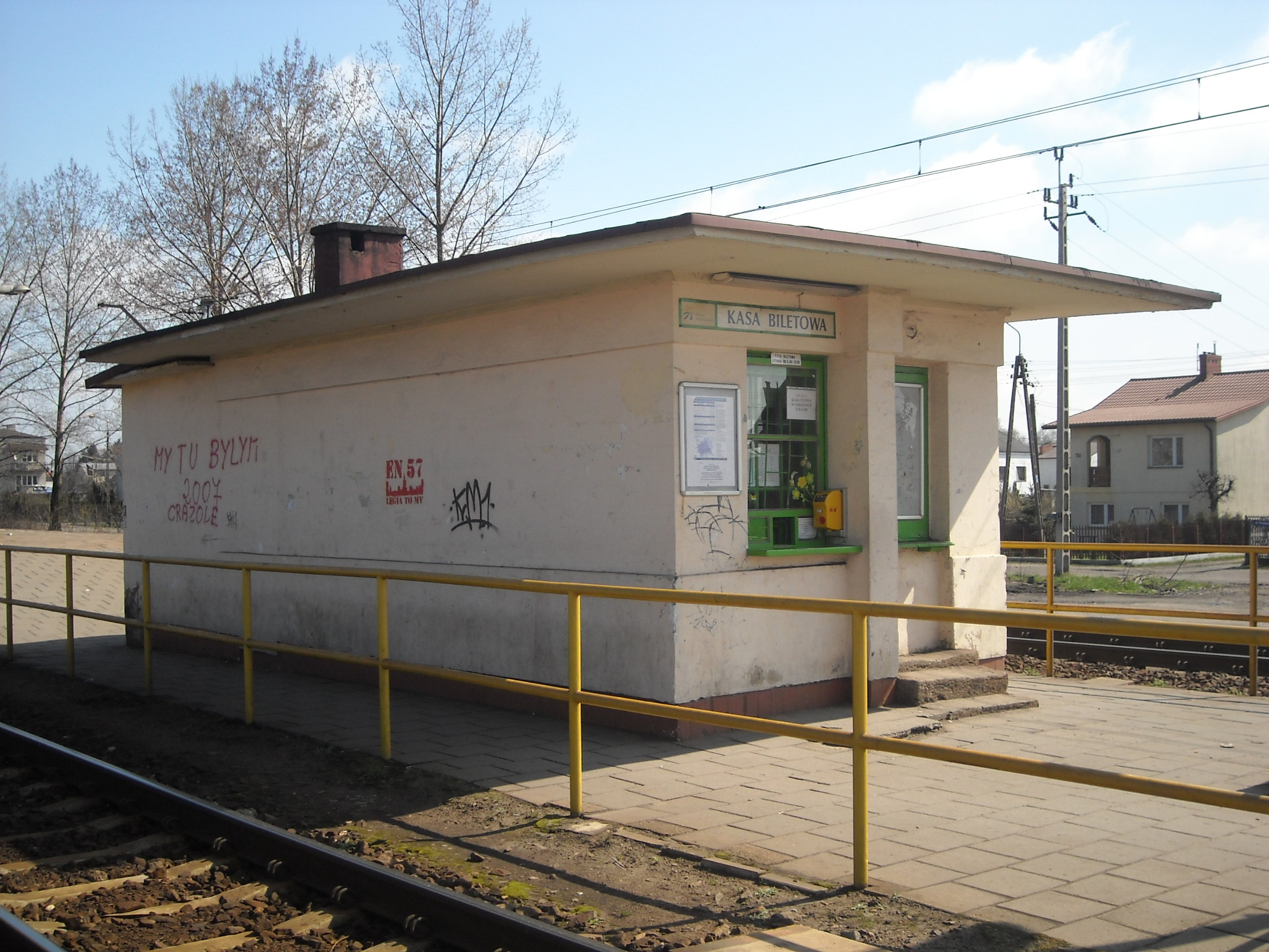 Kasa biletowa na przystanku kolejowym Zagościniec.